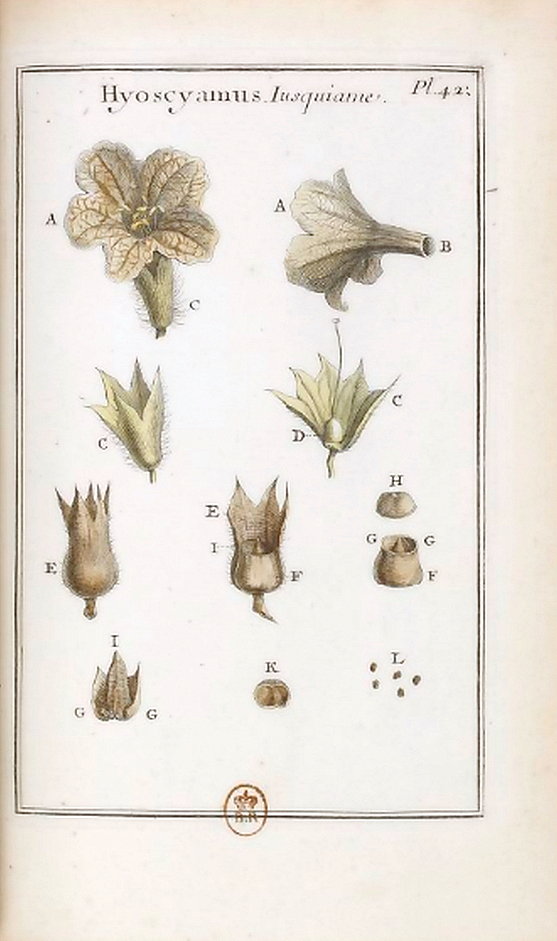 Hyoscyamus: Ilustración original del género en Joseph Pitton de Tournefort, creador del taxón, 1694 - Leyenda: A: Flor; B: Apertura basal de la corola; C: Cáliz; D: Pistilo ;E. Cáliz en la fructificación, F: Fruto, H-K: Tapa del fruto; I: Tabique del fruto; G: Lóculos del fruto; L: Simientes.